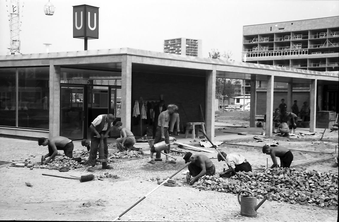 Berlin: Interbau; U-Bahnhof Hansaplatz; südlicher Eingang